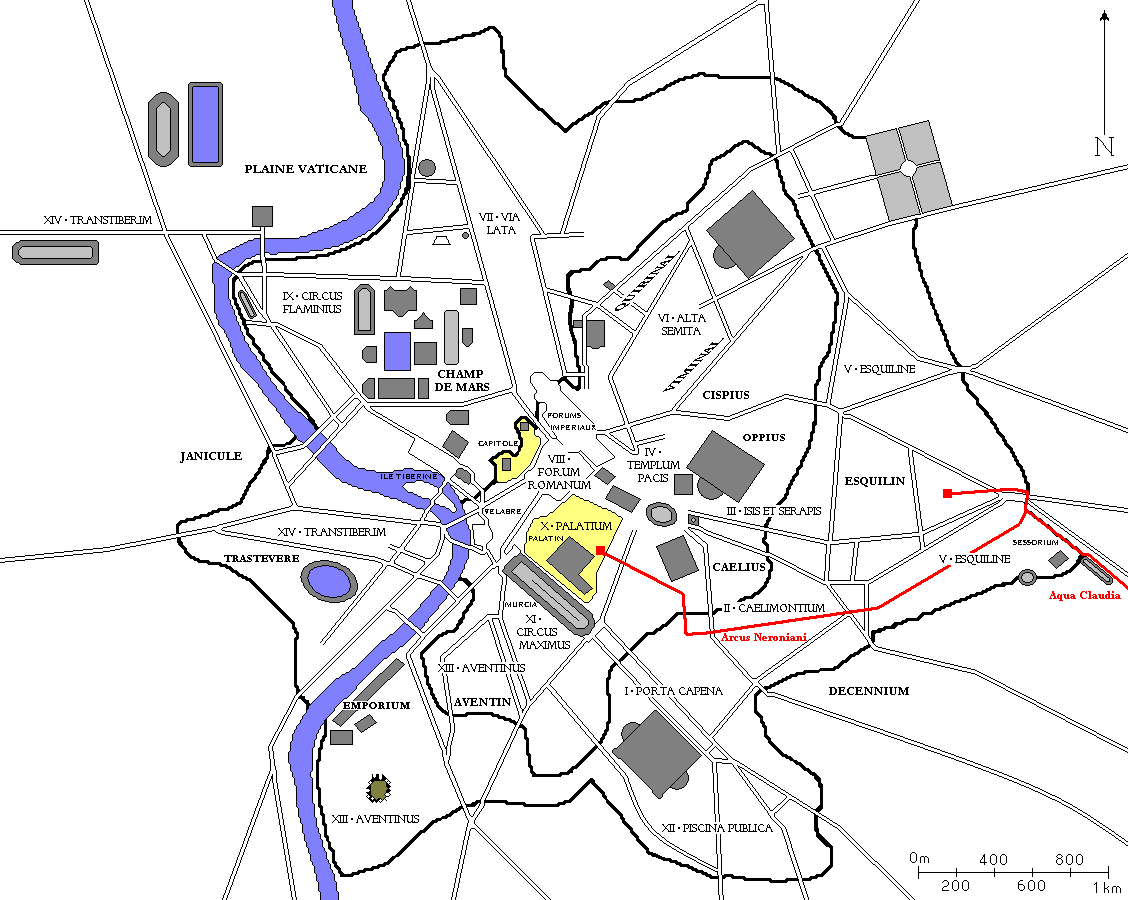 Plan de Rome avec l'Arcus Neroniani en rouge